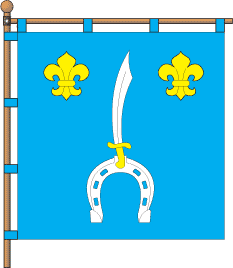 Прапор с. Козин (Радивилівський район)